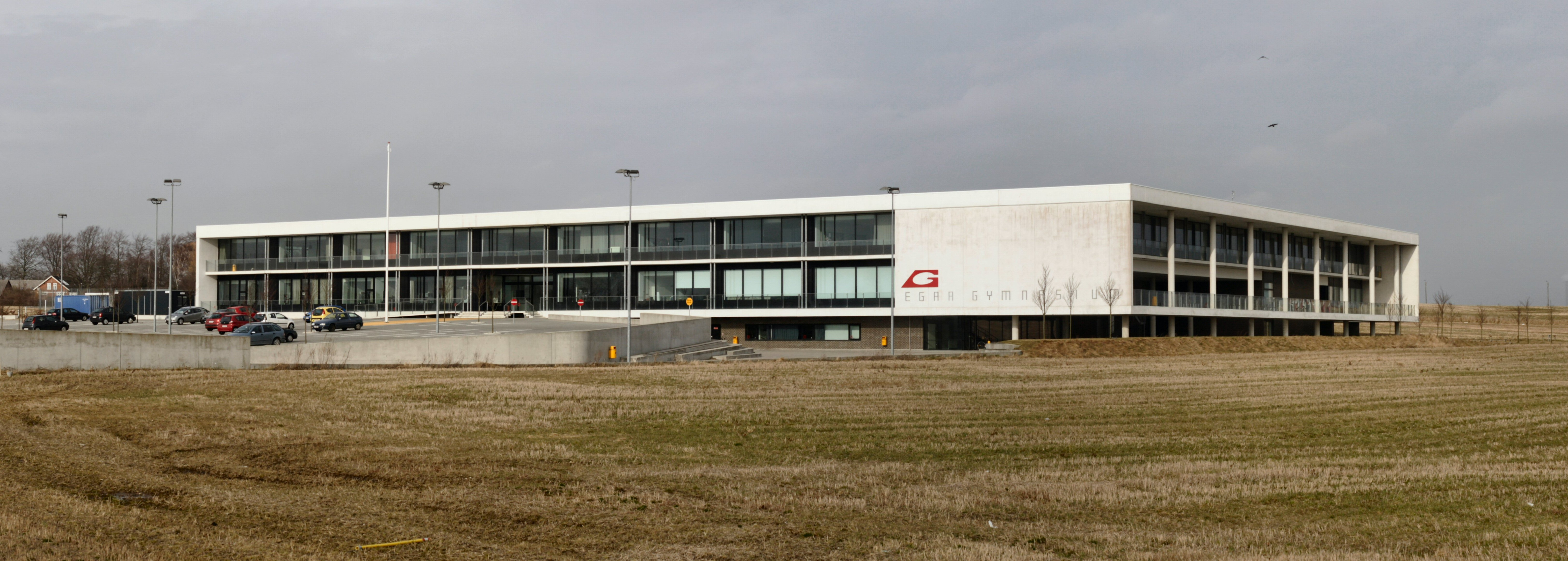 Egå Gymnasium